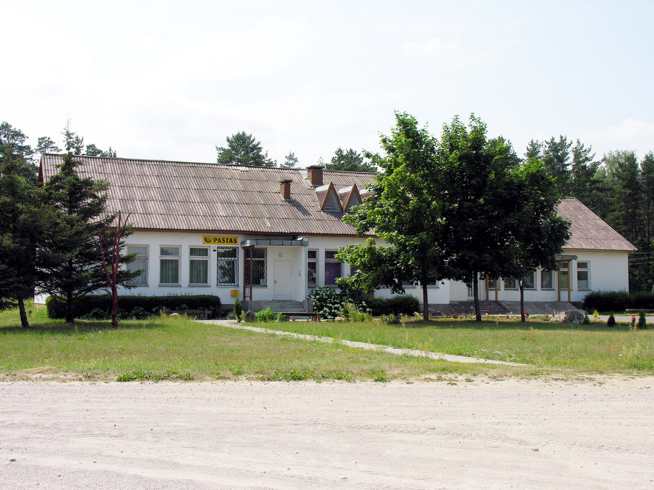 Užlieknė, Mažeikių raj., Tirkšlių seniūnija Paštas ir medicinos punktas Foto: Algirdas, 2006 m. liepos 12 d., Lietuva